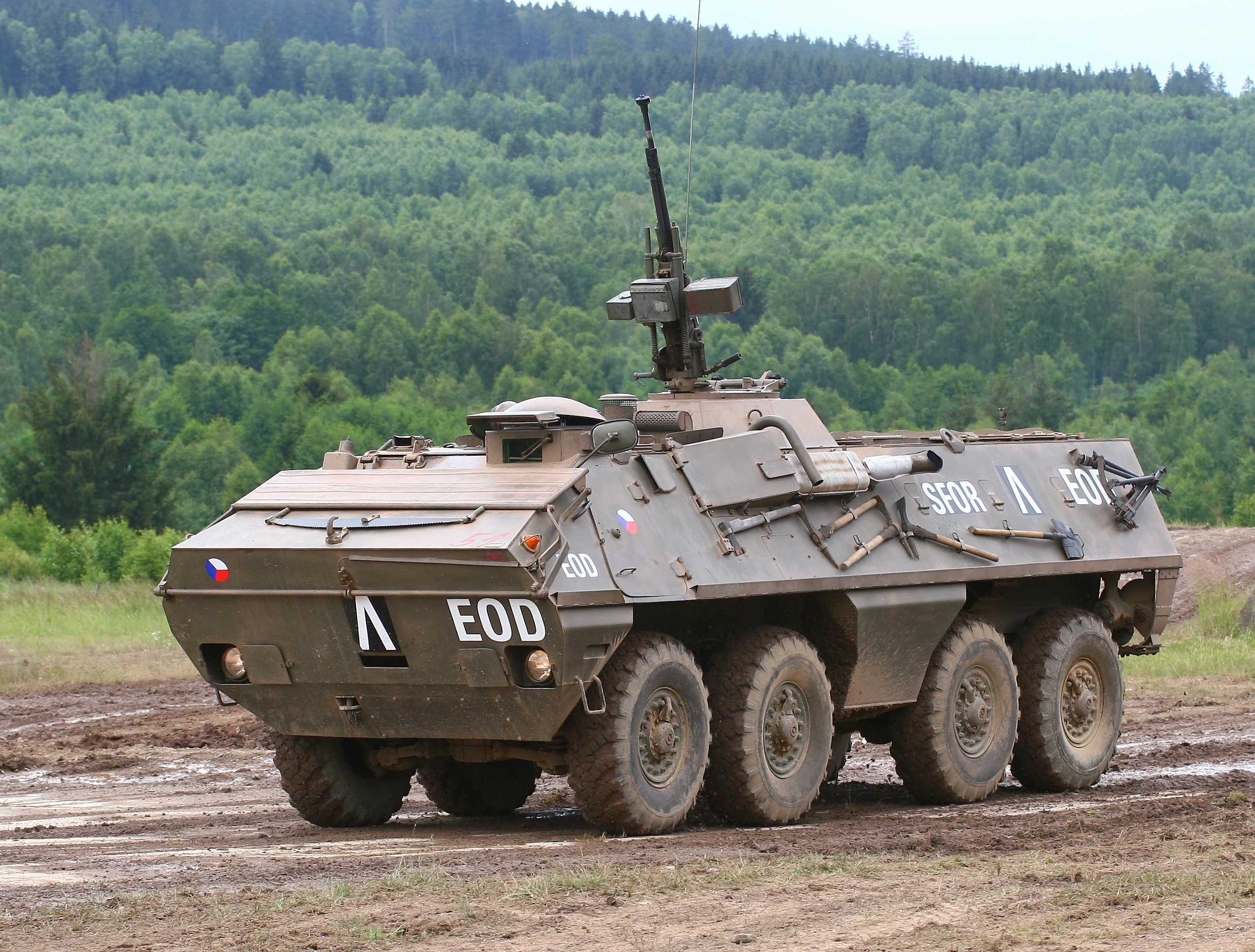 Vojenská technika zaznamenaná při dynamických ukázkách na Dni pozemního vojska BAHNA 2018, který pořádá Velitel společných sil a Nadace pozemního vojska AČR.